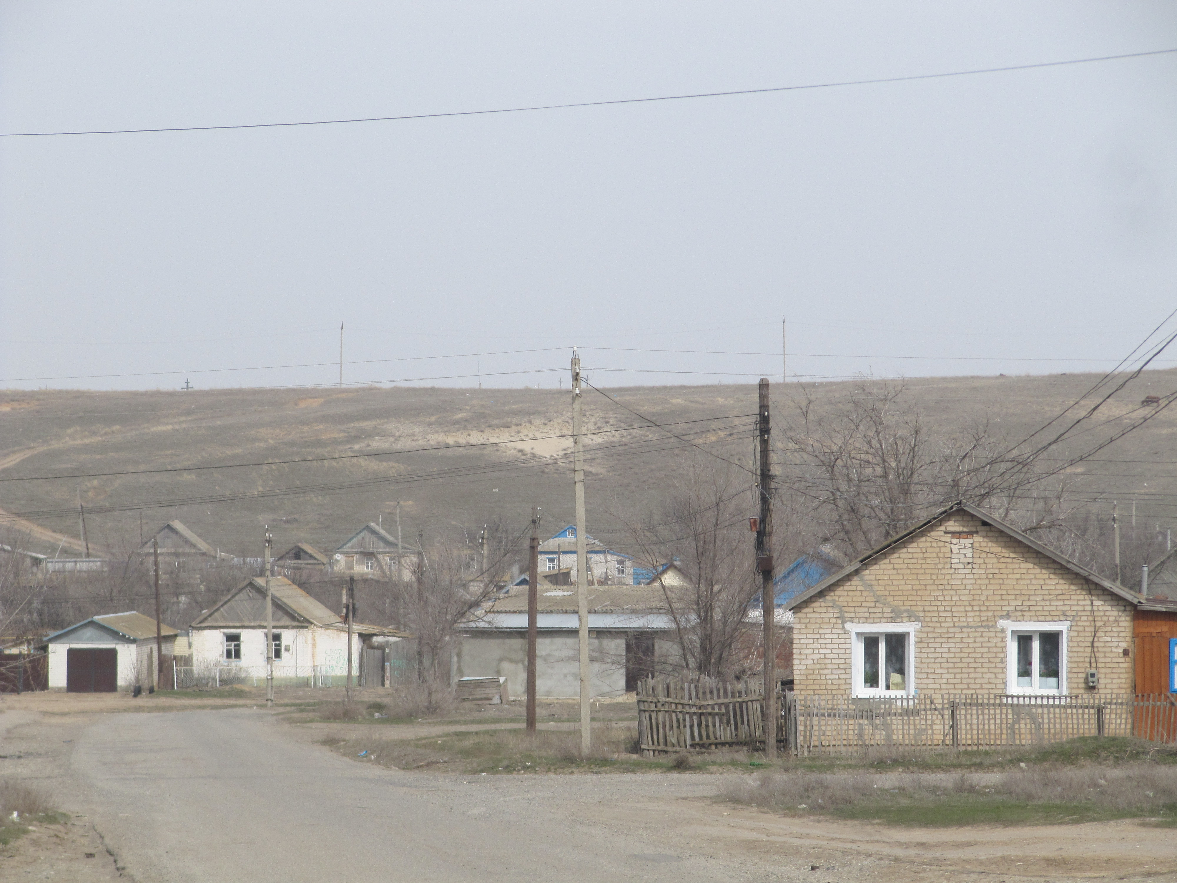 Садовое, Калмыкия